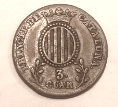 Data: 1837, rainha Isabel II.